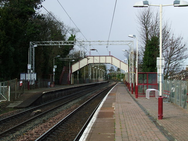 Langbank station